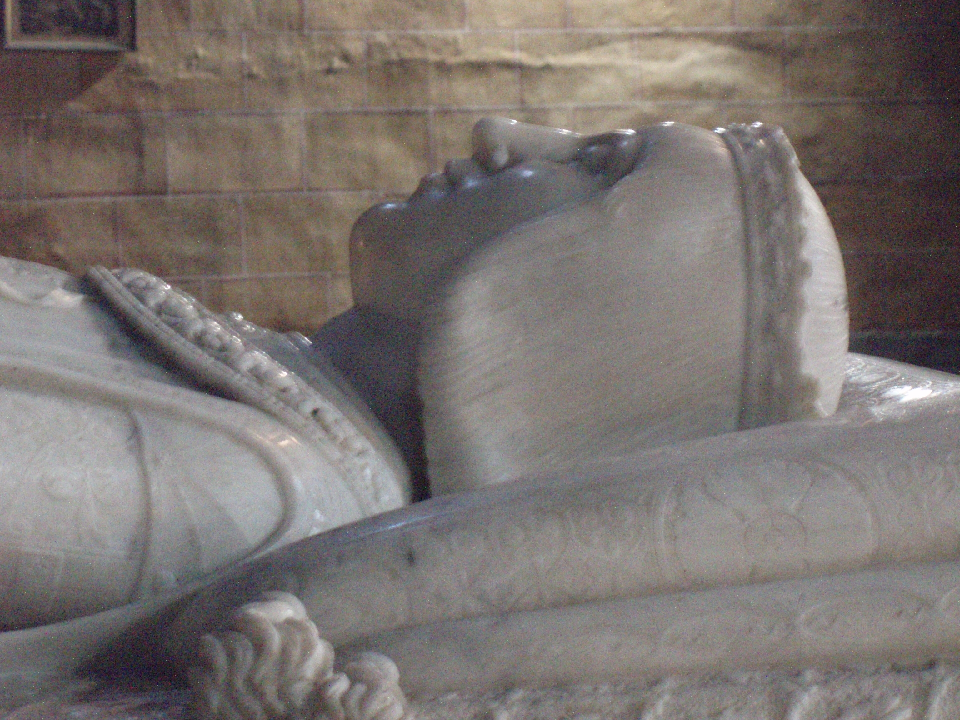 Ávila. Sepulcro del Príncipe Don Juan